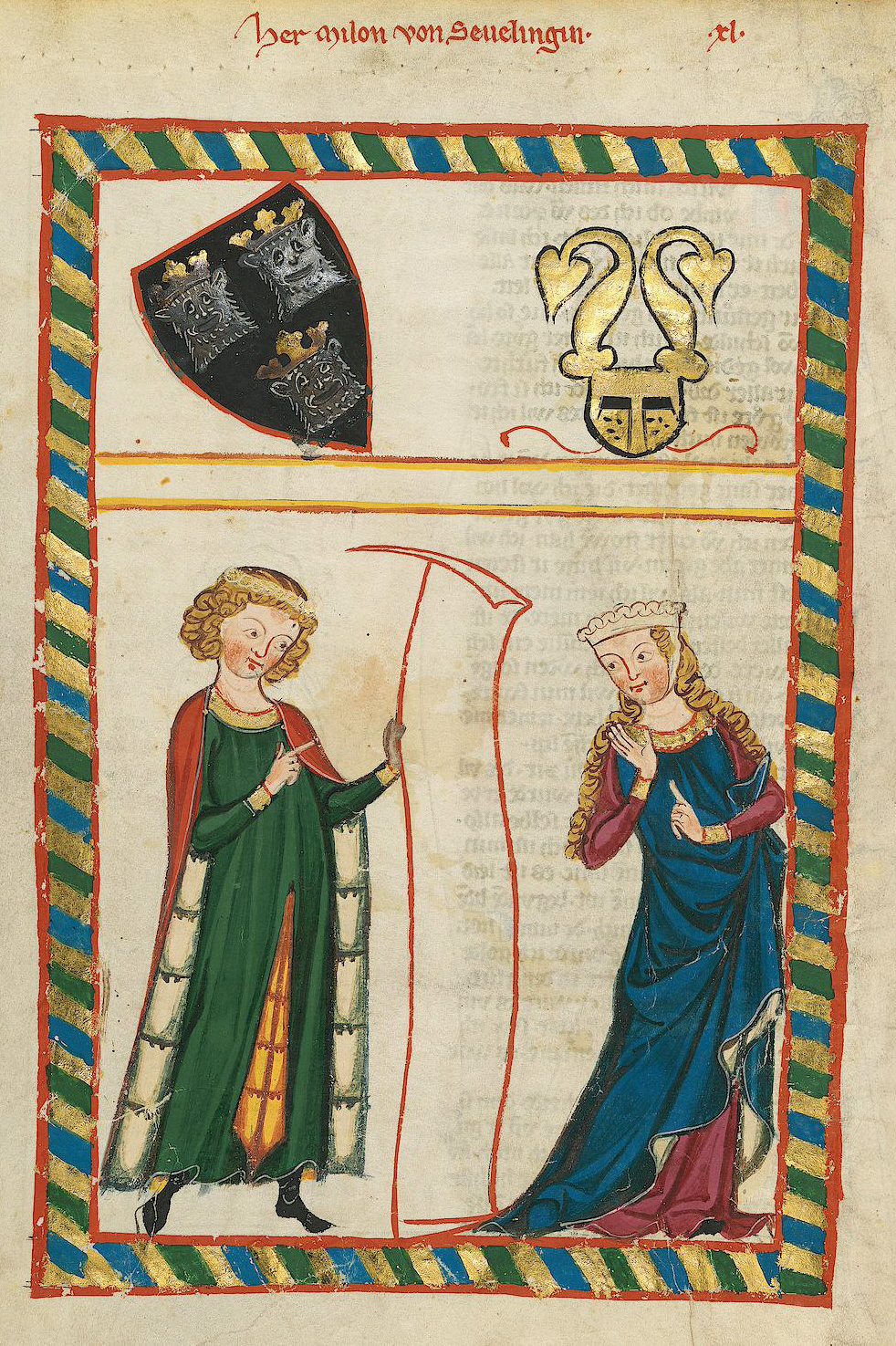 Codex Manesse, UB Heidelberg, Cod. Pal. germ. 848, fol. 120v: Meinloh von Sevelingen